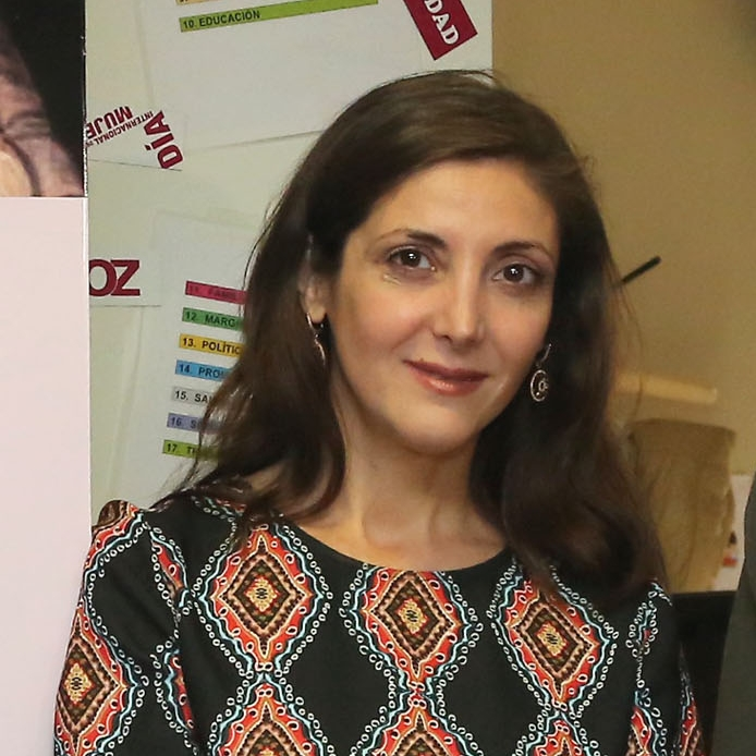 Espido Freire en el Centro de Documentación del Instituto de la Mujer y la Biblioteca de Castilla-La Mancha.